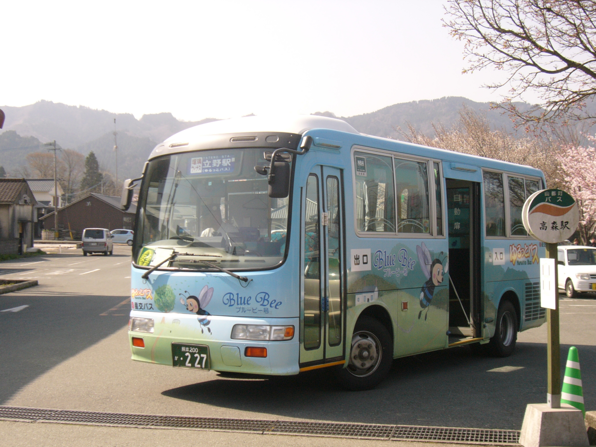 登録番号：熊本200か227（南阿蘇コミュニティバス「ゆるっとバス」） 撮影場所：高森駅にて